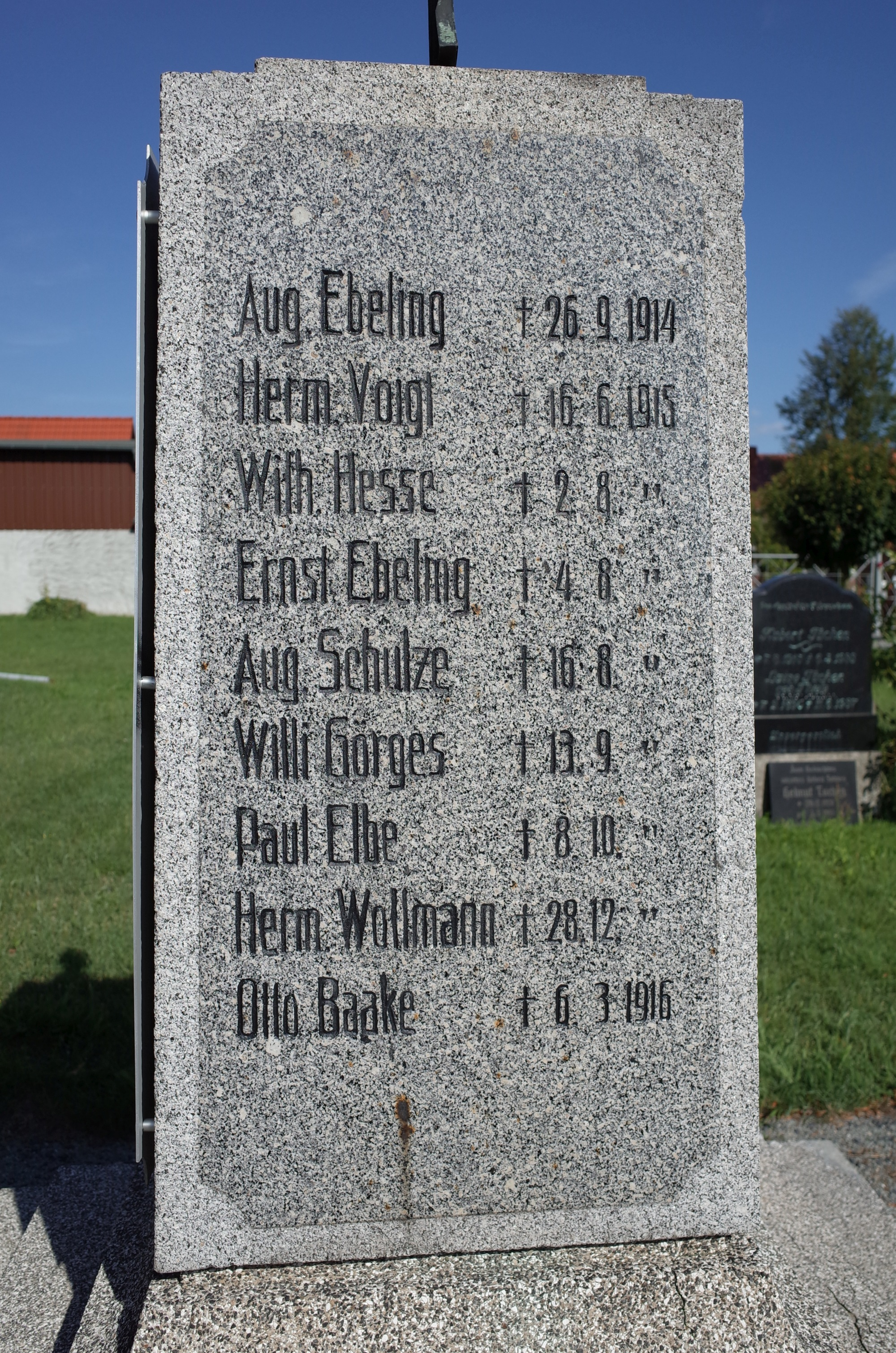 Gommern, Kriegerdenkmal im Ortsteil Vehlitz (Westseite, I. Weltkrieg, Gefallen 1914-16)